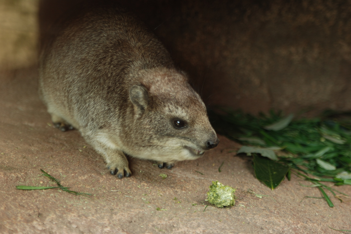 天王寺動物園のケープハイラックス。